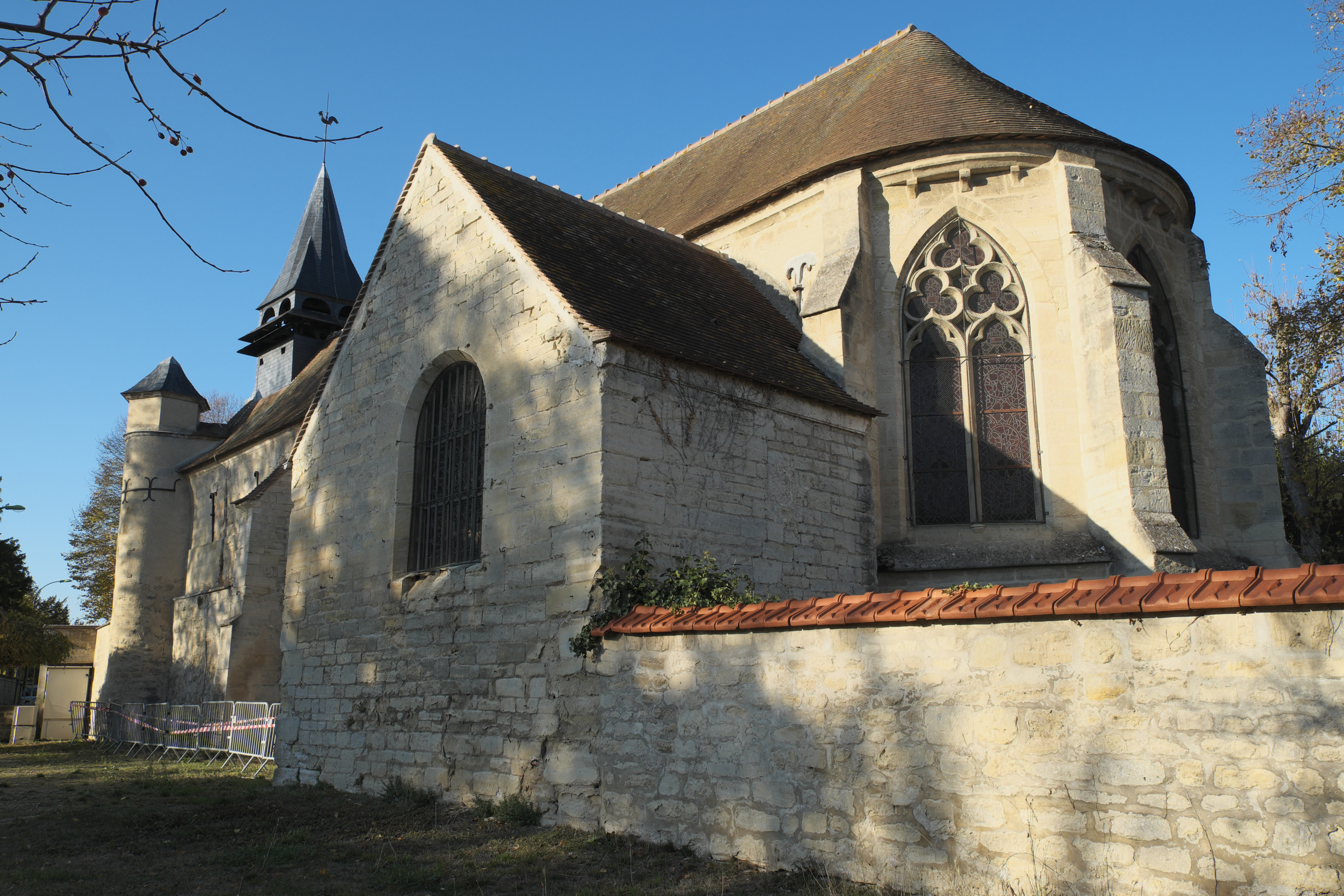 Katholische Kapelle Saint-Léonard, ehemalige Pfarrkirche, in Croissy-sur-Seine im Département Yvelines (Île-de-France/Frankreich)